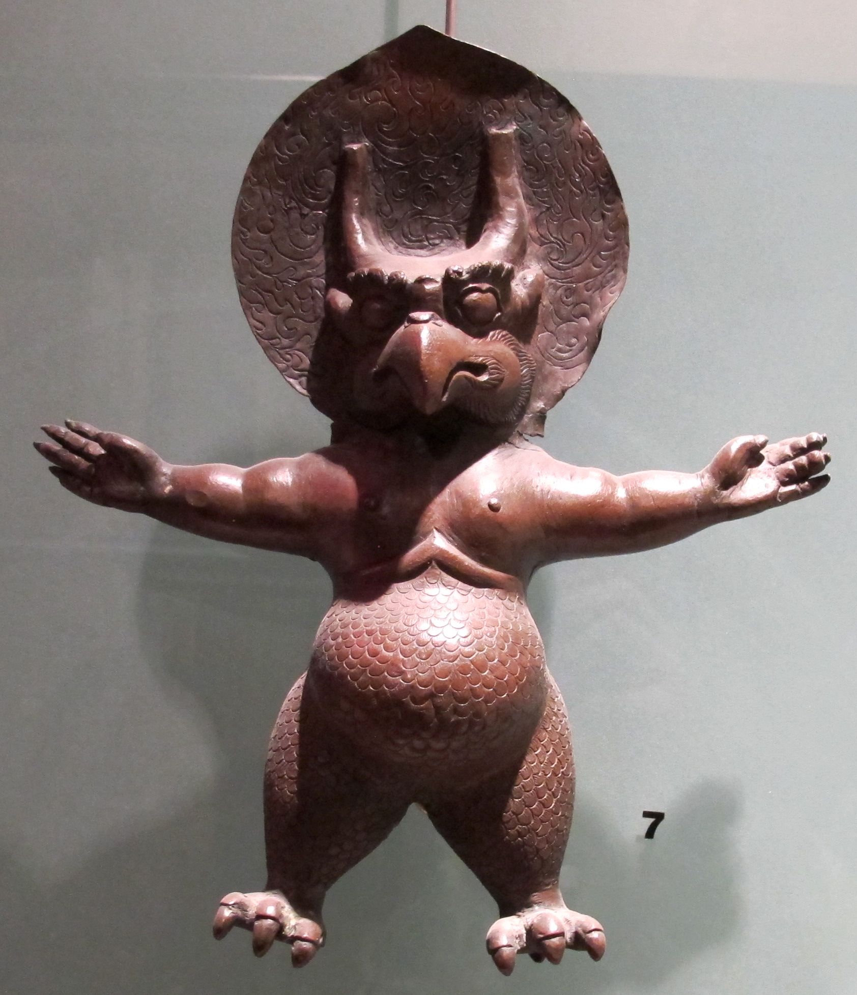 Galleria Farnese (Museo di Capodimonte)